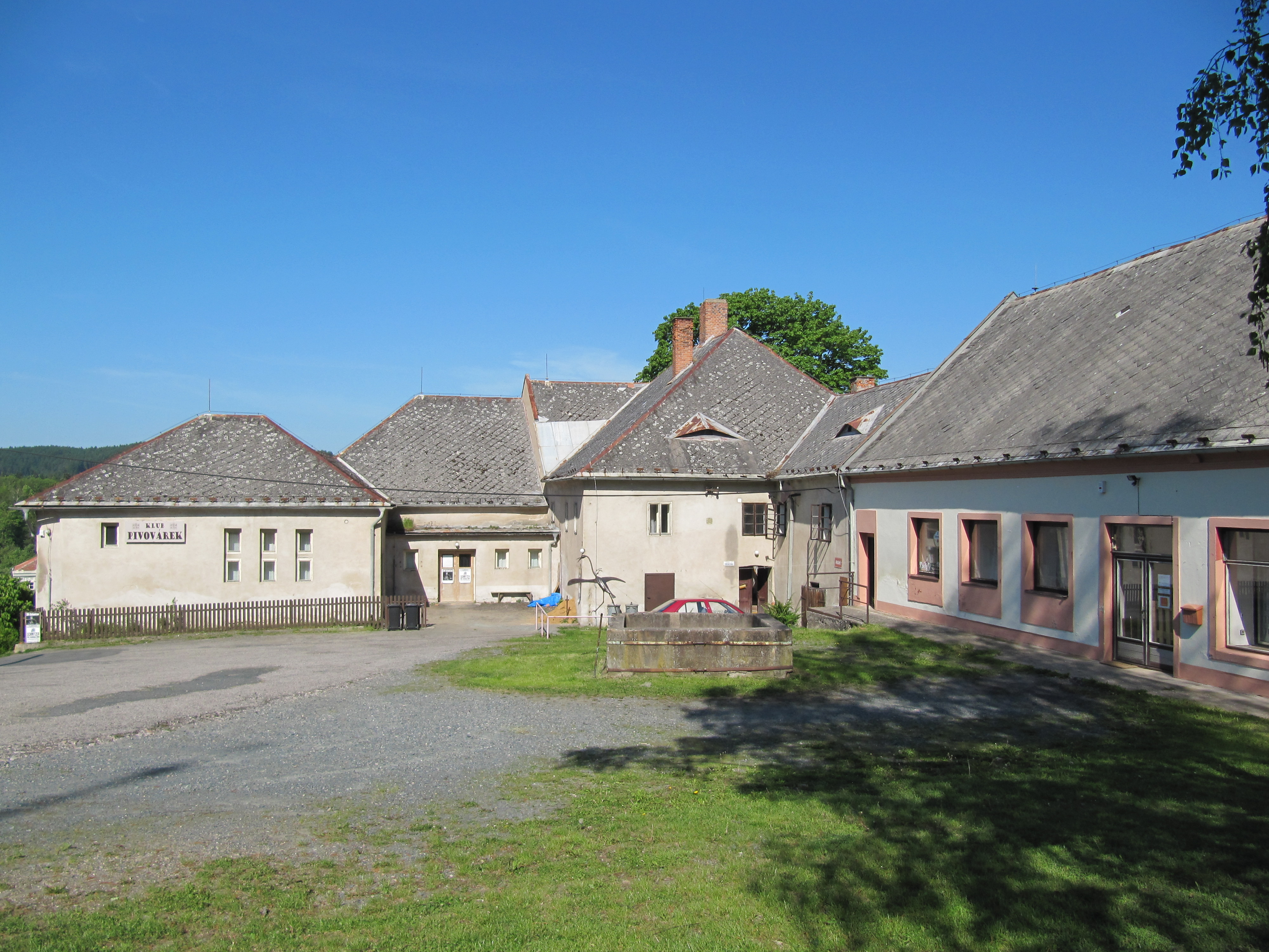 Rataje nad Sázavou